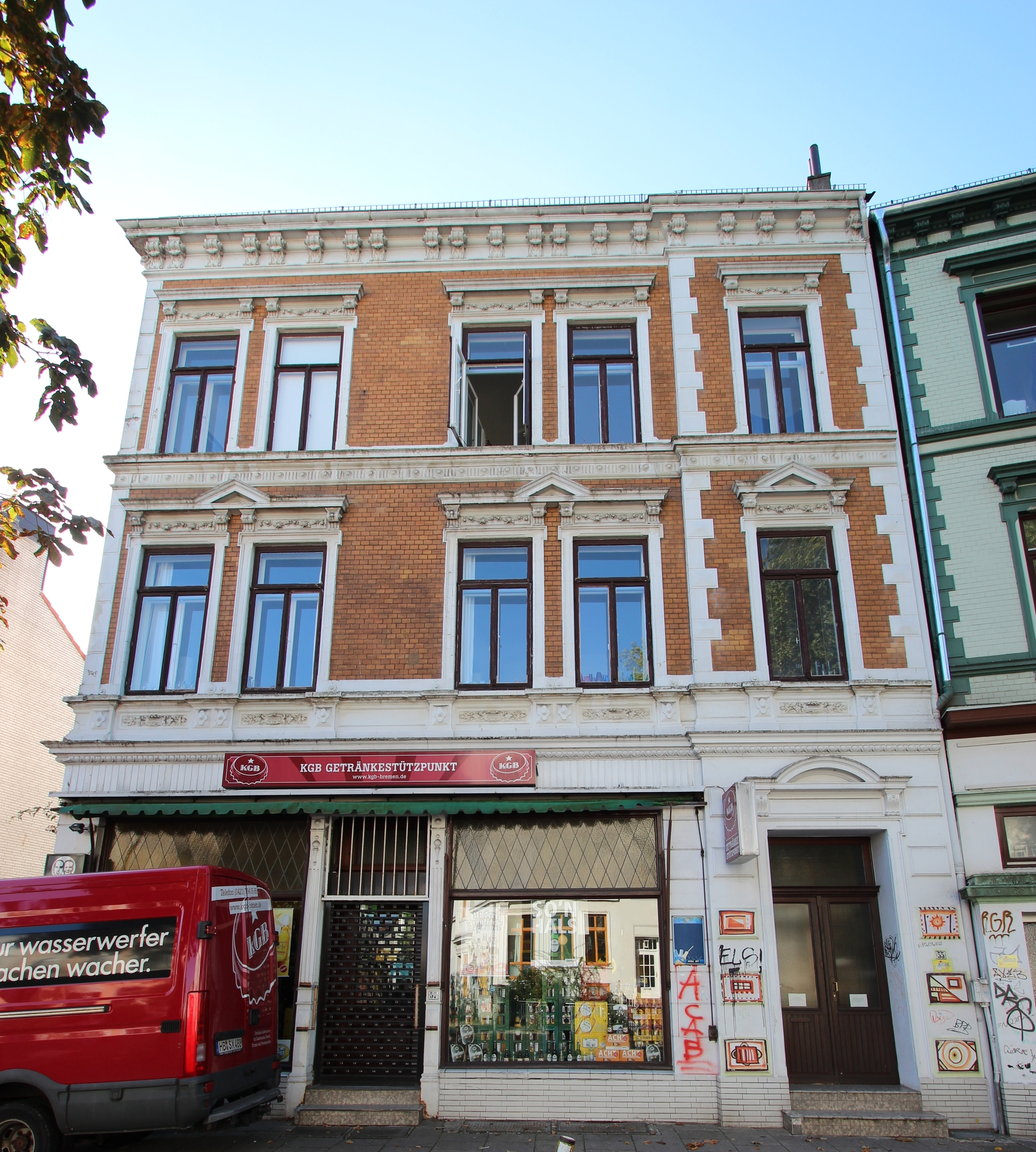 Wohnhaus in Bremen, Sielwall 55Das abgebildete Objekt ist ein geschütztes Kulturdenkmal in der Freien Hansestadt Bremen, mit der Nr. 1741 beim Landesamt für Denkmalpflege registriert.